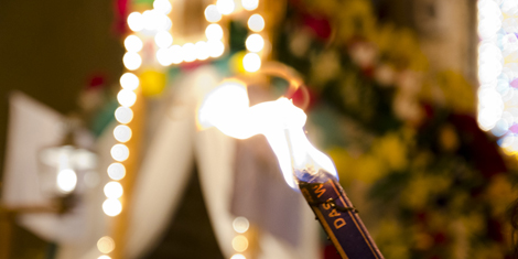 fiaccolata che accompagna i carri nella sera del 25 intonando l'Inno al Santo Protettore